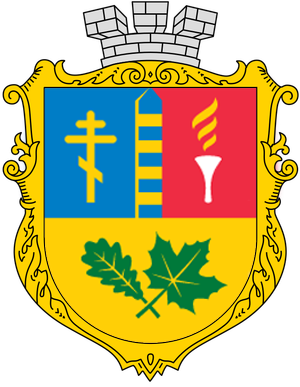 Герб міста Середина-Буда